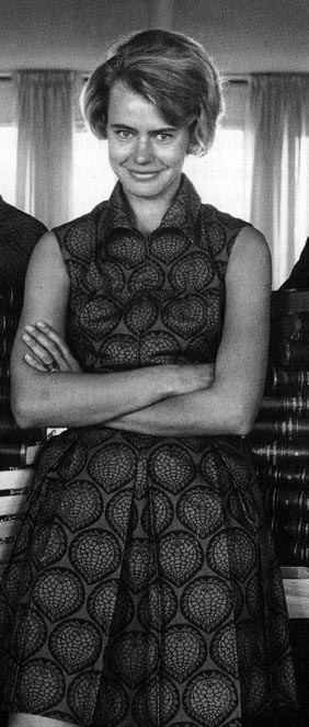 Cilla Ingvar